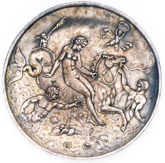 Silver Plate from Yenikand, Azerbaijan